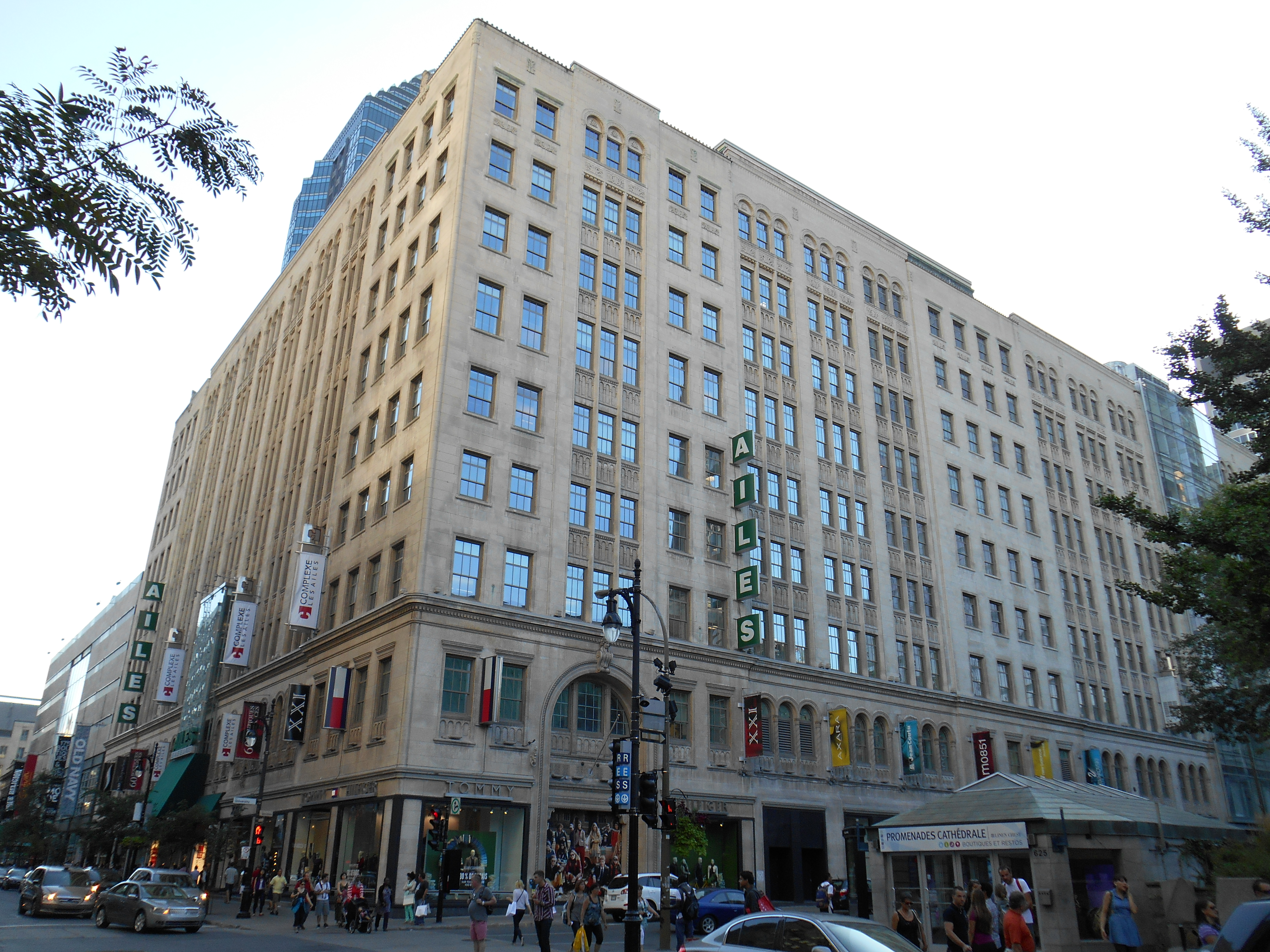 Complexe les Ailes (autres noms : Centre Eaton, Magasin Eaton), 677, rue Sainte-Catherine Ouest, Montréal